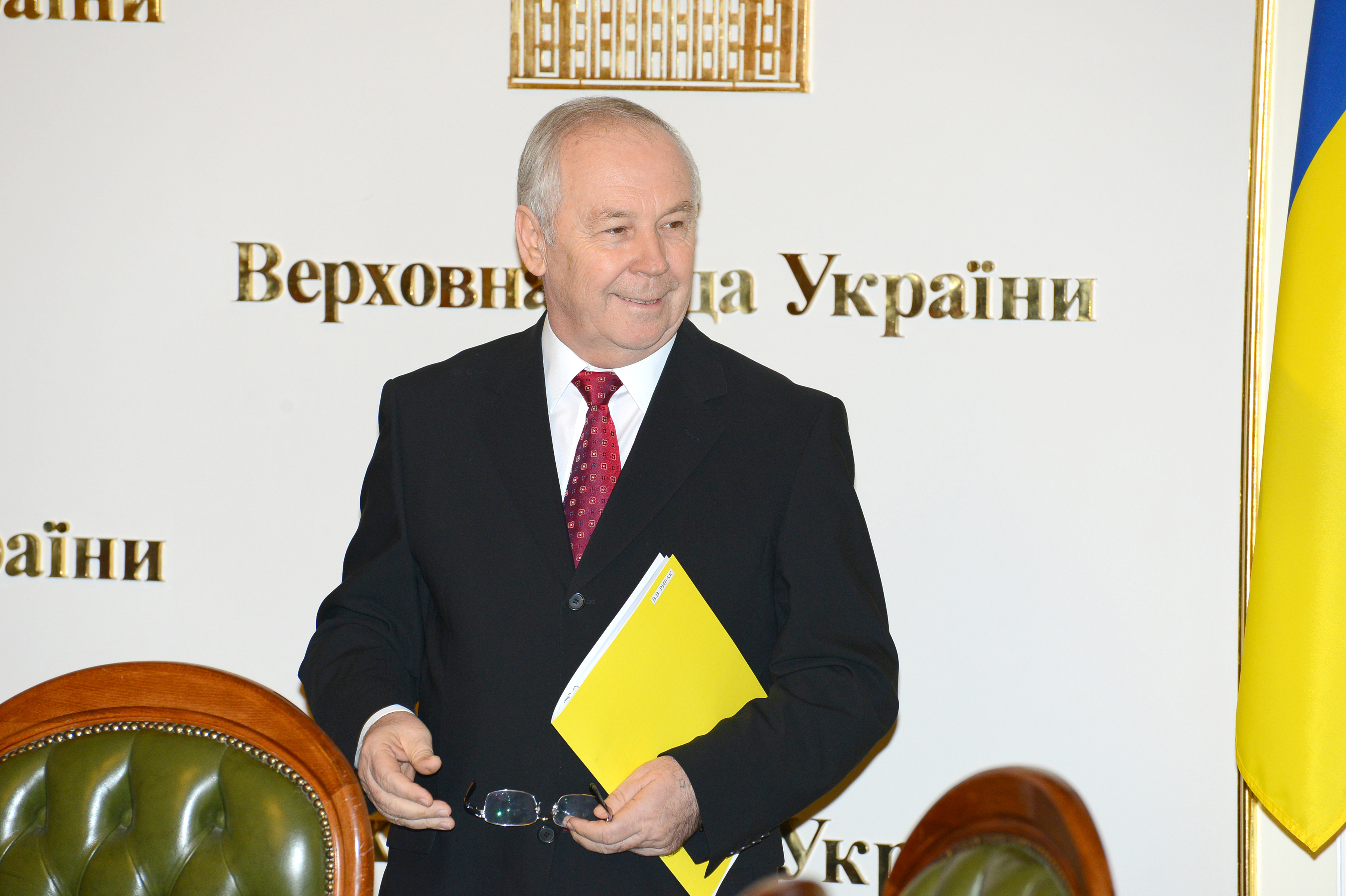 ВЕРХОВНАЯ РАДА УКРАИНЫ 2013 , фото Вадим Чуприна ©